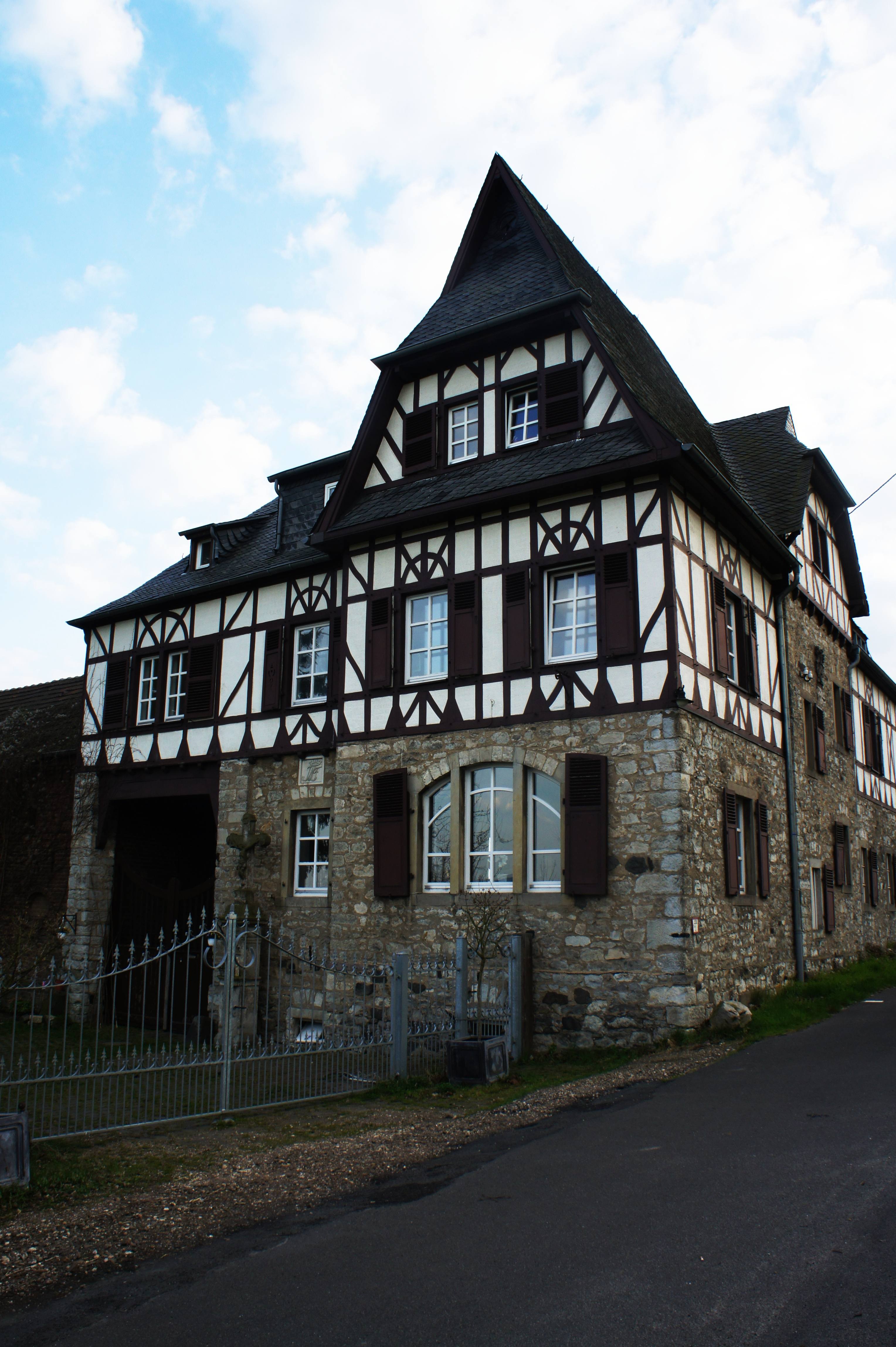 Jesuitenhof, Rathausstraße, Wachtberg-Berkum